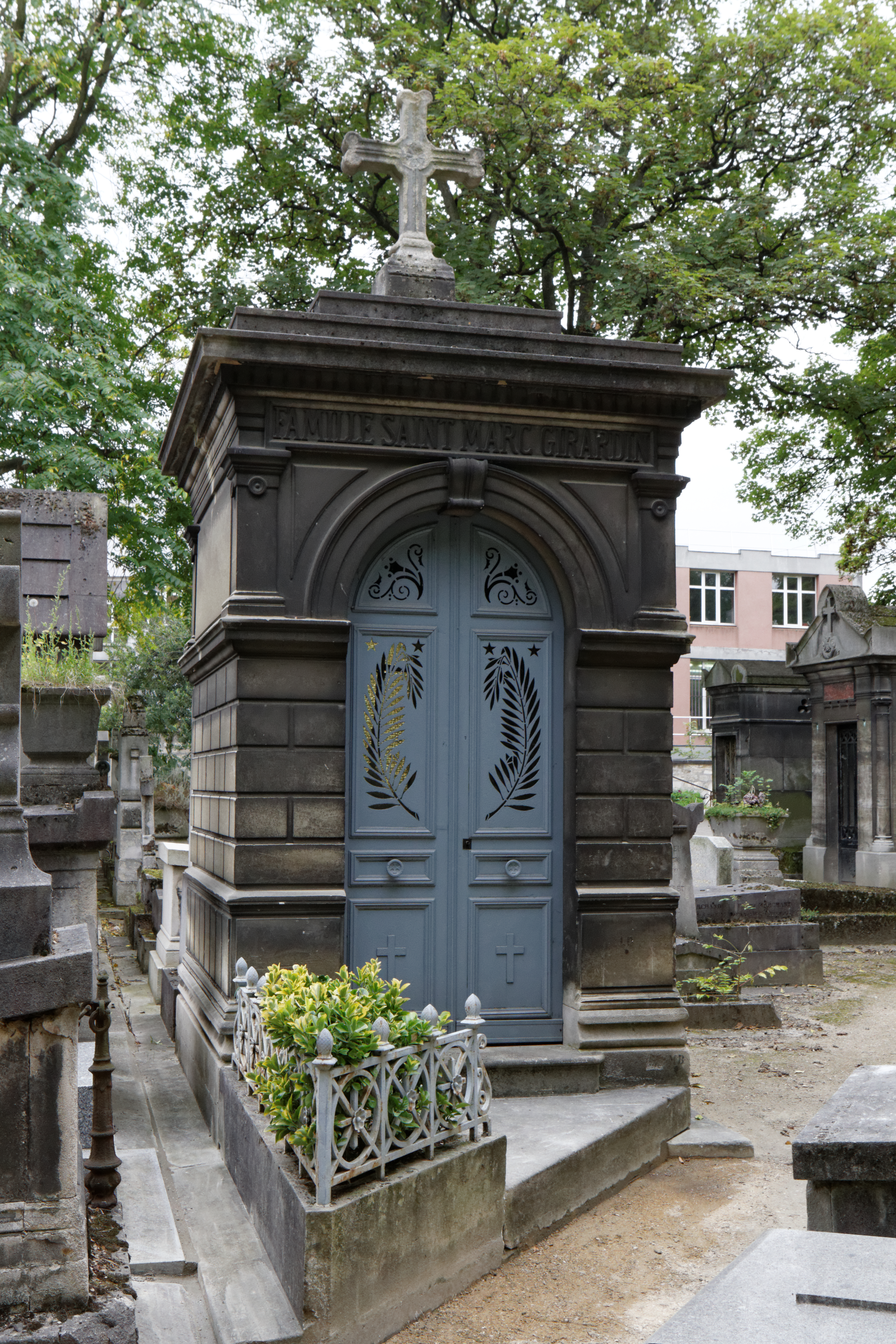 Sépulture de Saint-Marc Girardin (1801-1873), universitaire, critique littéraire et homme politique français .